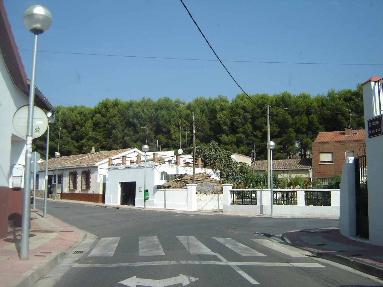 Calle típica del Barrio de Yagüe, Logroño (La Rioja)